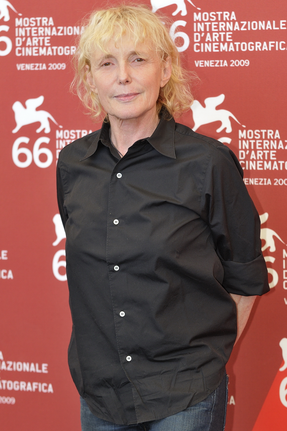 66ème Festival du Cinéma de Venise (Mostra), 5ème jour (06/09/2009) Photocall avec directrice Claire Denis pour son film en compétition : White Material